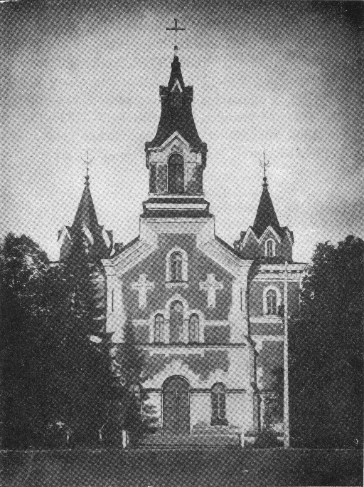 Кирха св. Марии Магдалины прихода Венйоки.